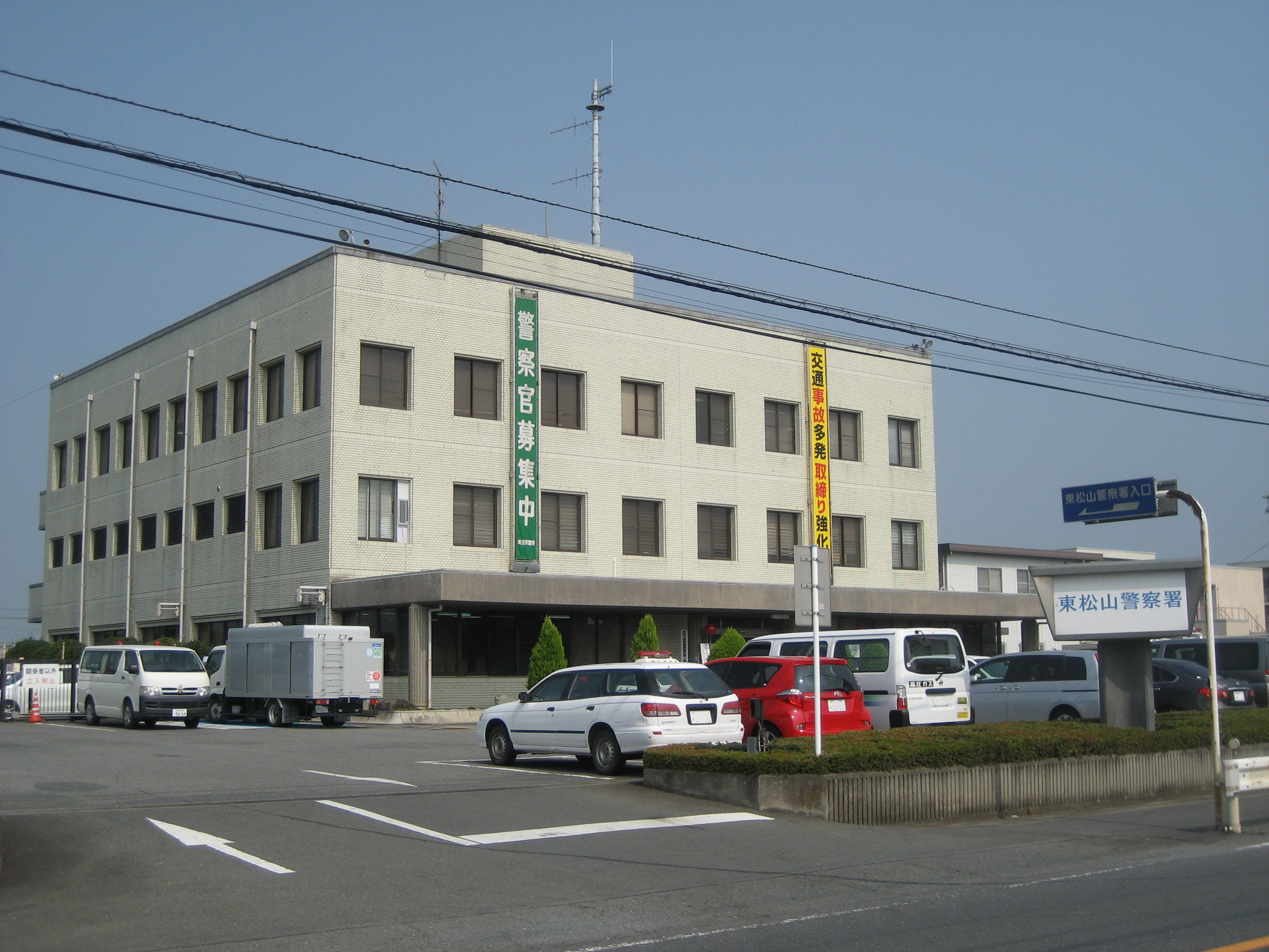 埼玉県東松山警察署庁舎